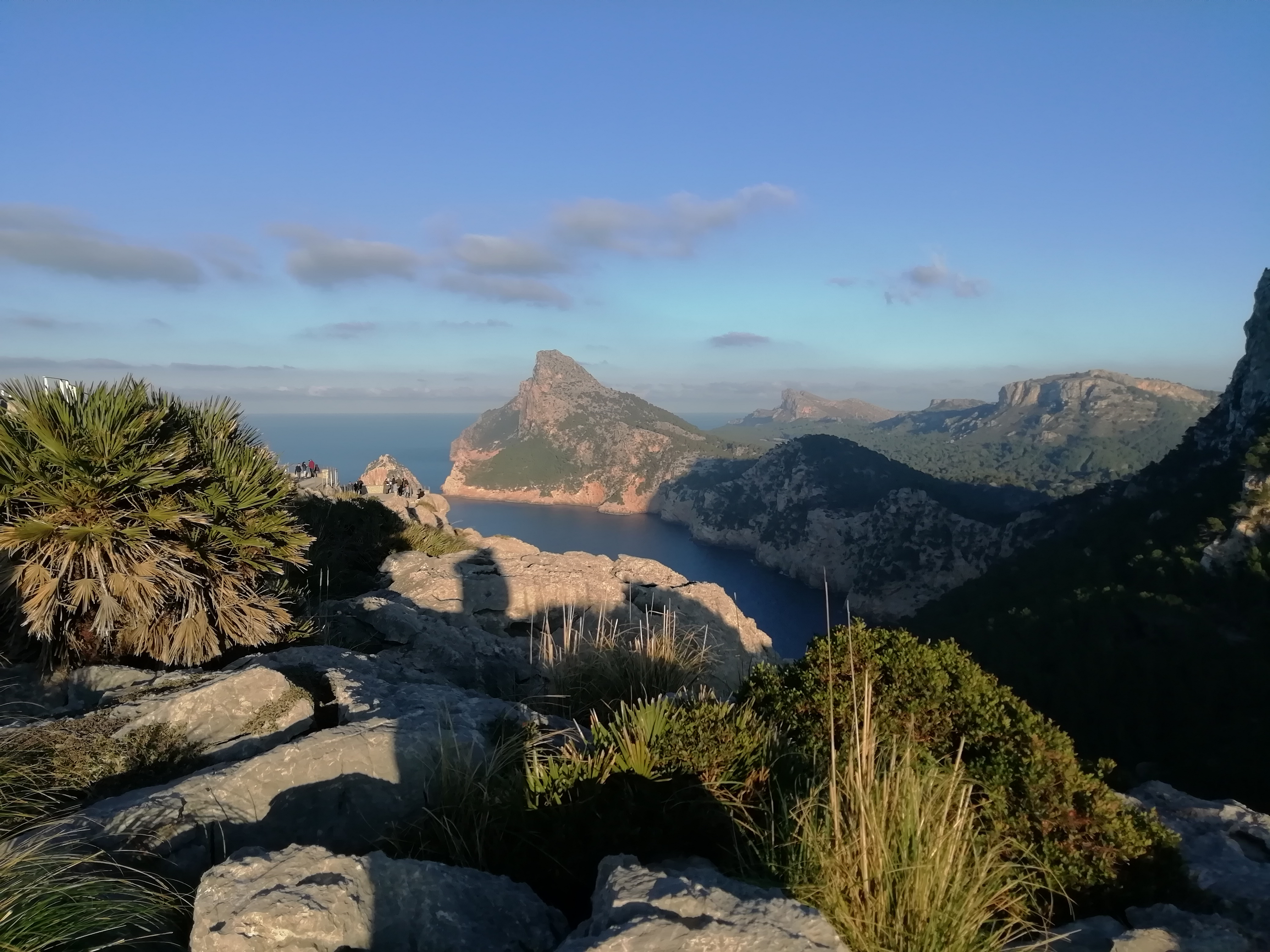 Pollensa, Mallorca.